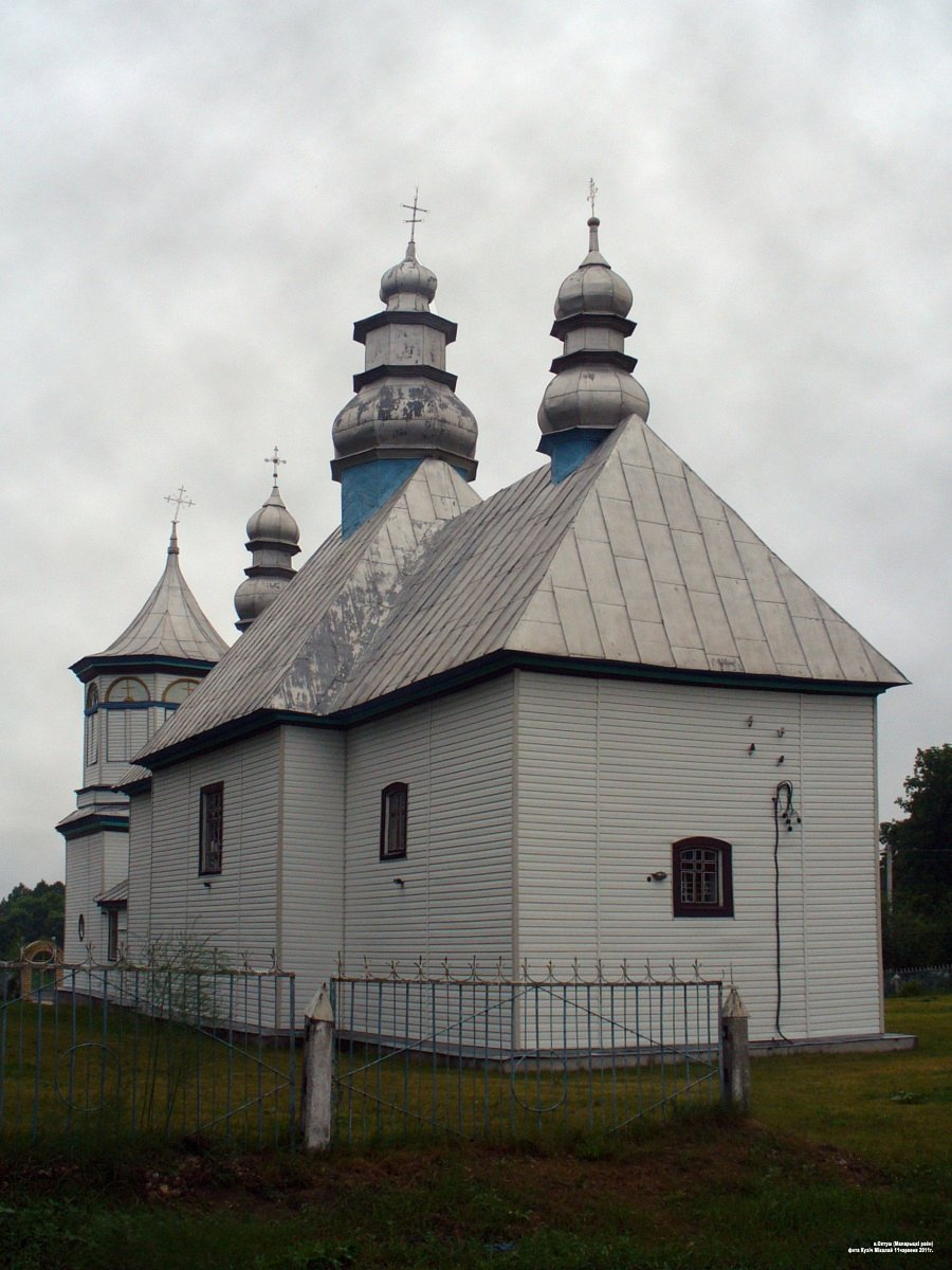 Олтуш. Спаса-Праабражэнская царква з сайдынгам